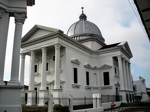 Catedral